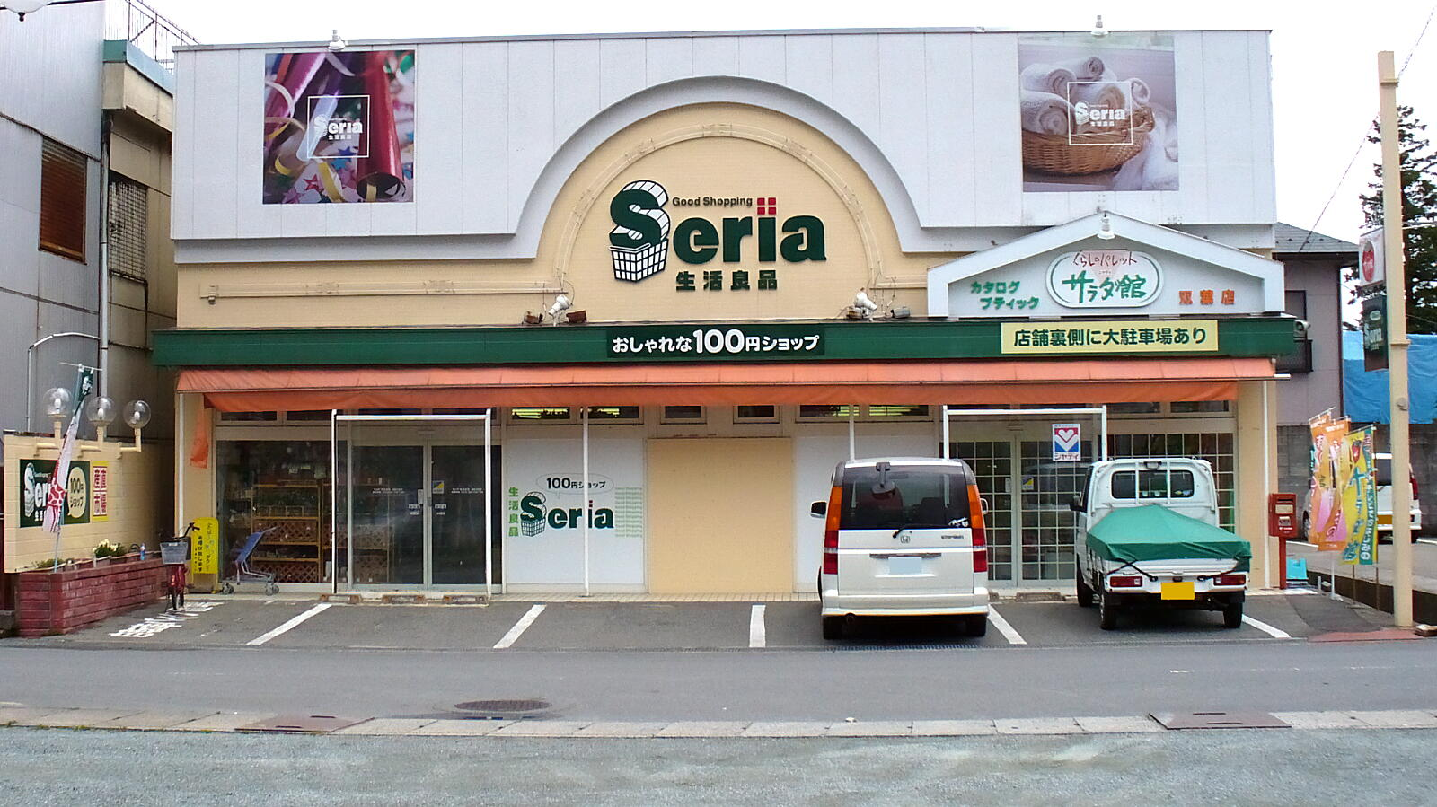 セリア生活用品・サラダ館双葉店